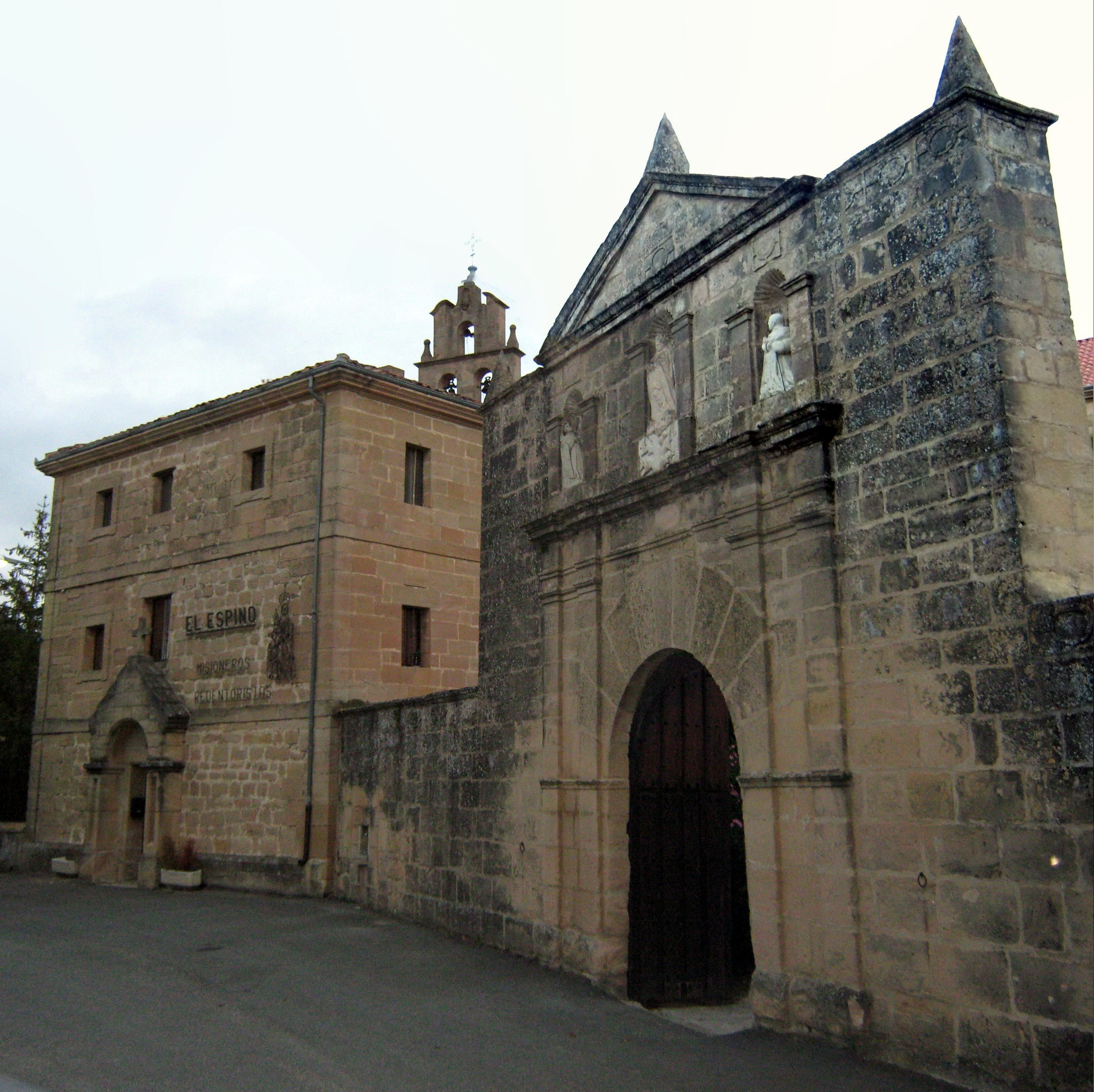 Convento de El Espino, Santa Gadea del Cid (Burgos)